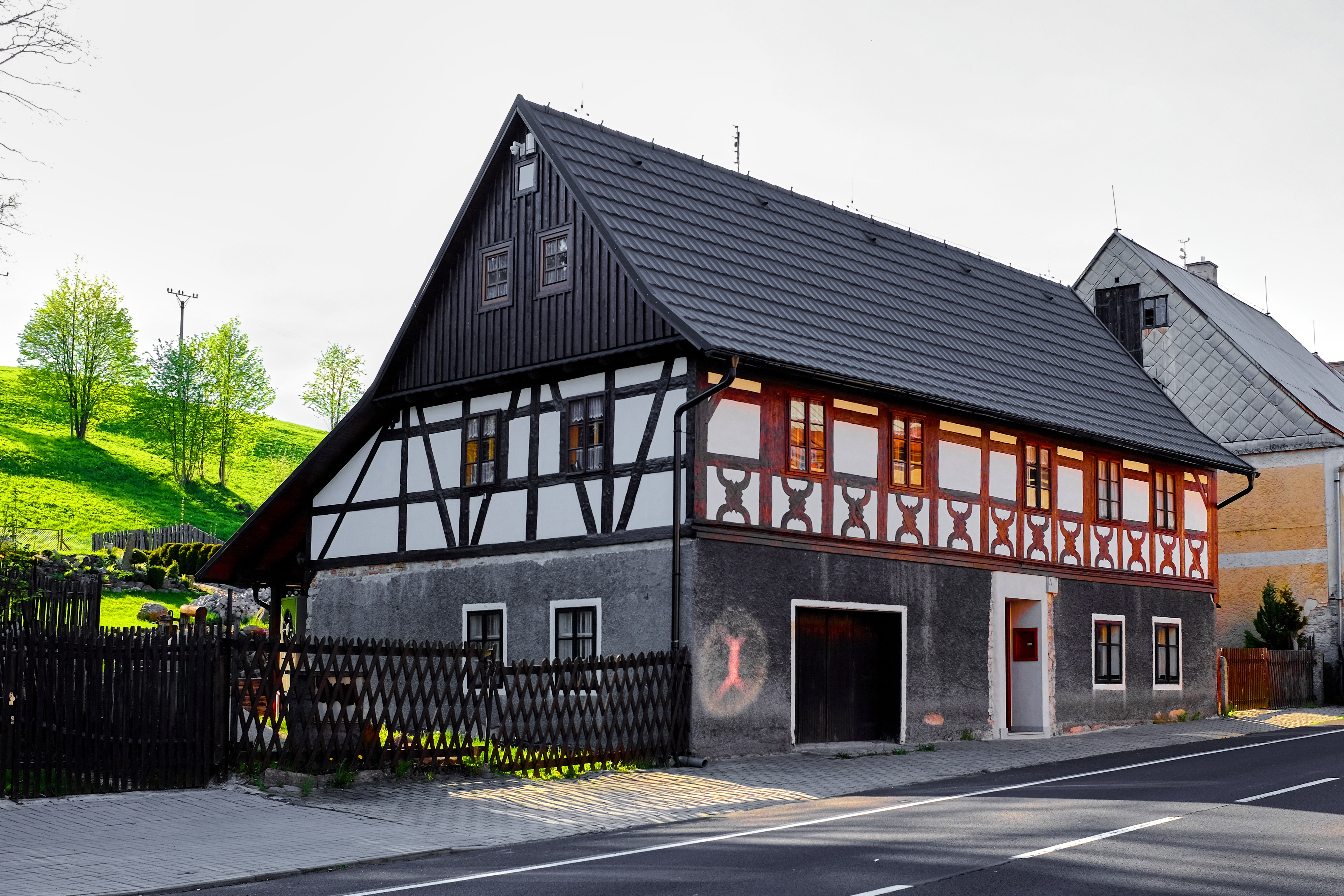 Pernink, obec v Krušných horách, hrázděný dům čp. 7, okres Karlovy Vary